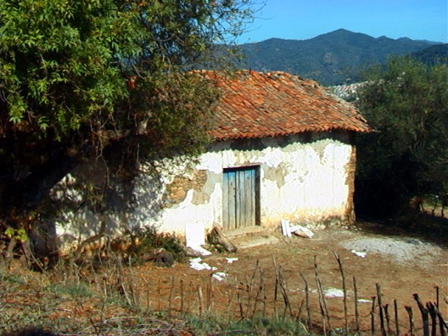 Maison à Djemaa Beni Habibi (Algérie)